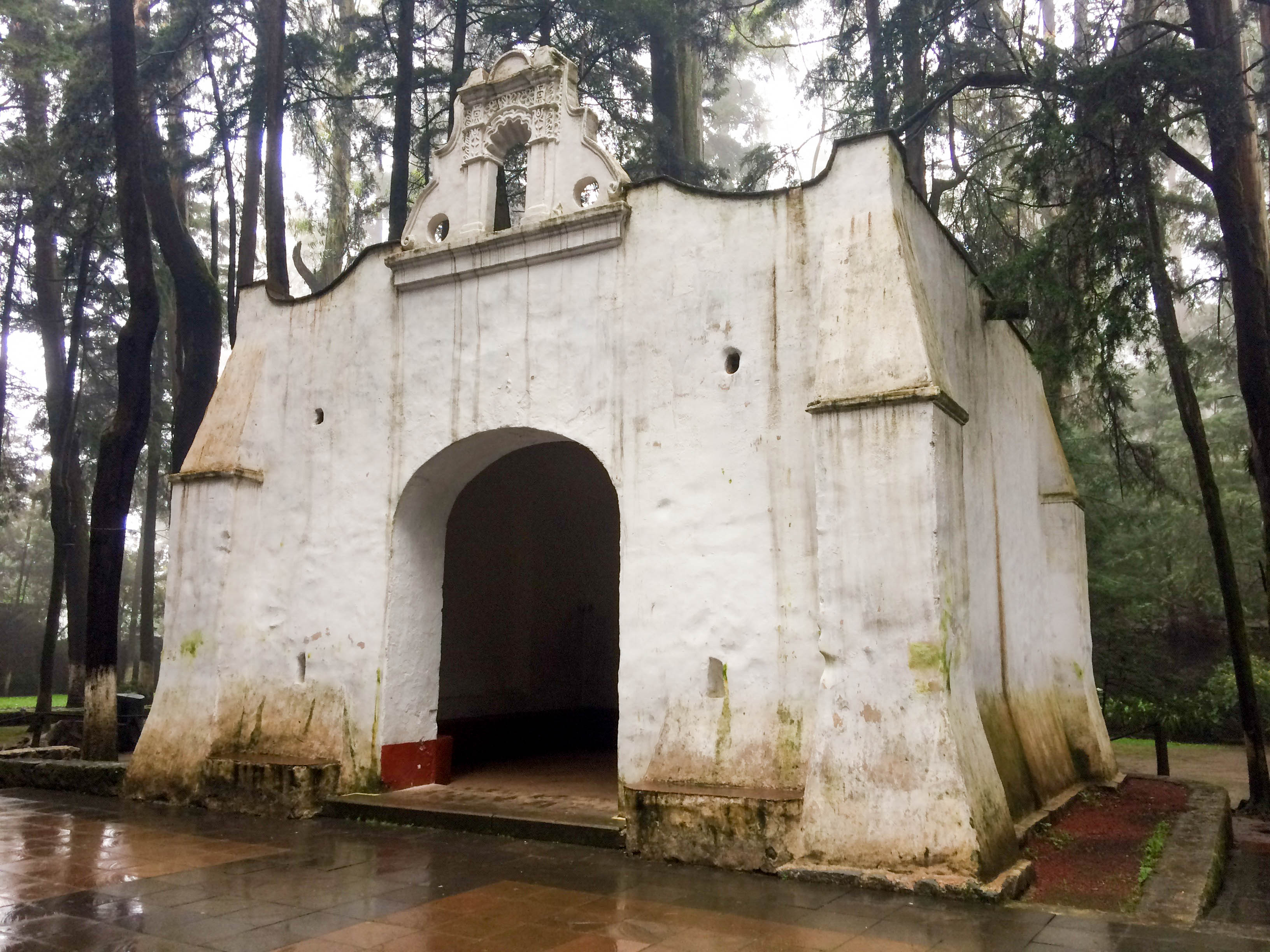 En ella los Carmelitas descalzos tenían conferencias acerca de temas religiosos. Este lugar era de los únicos momentos en los que tenían permitido comunicarse entre ellos.